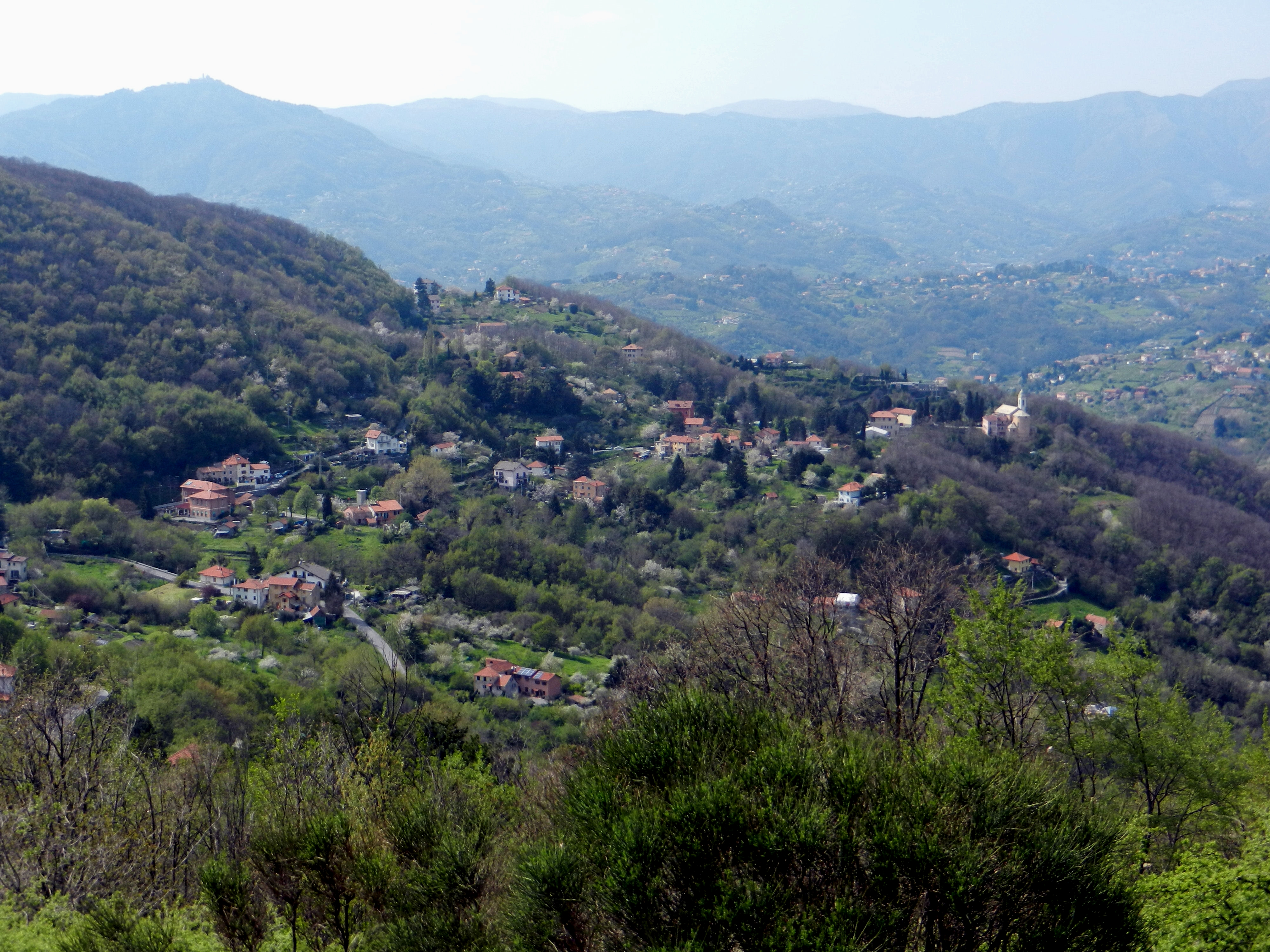 Sant'Olcese, città metropolitana di Genova, frazione Casanova